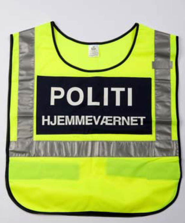 Refleksvest fra Hjemmeværnet (Politi).